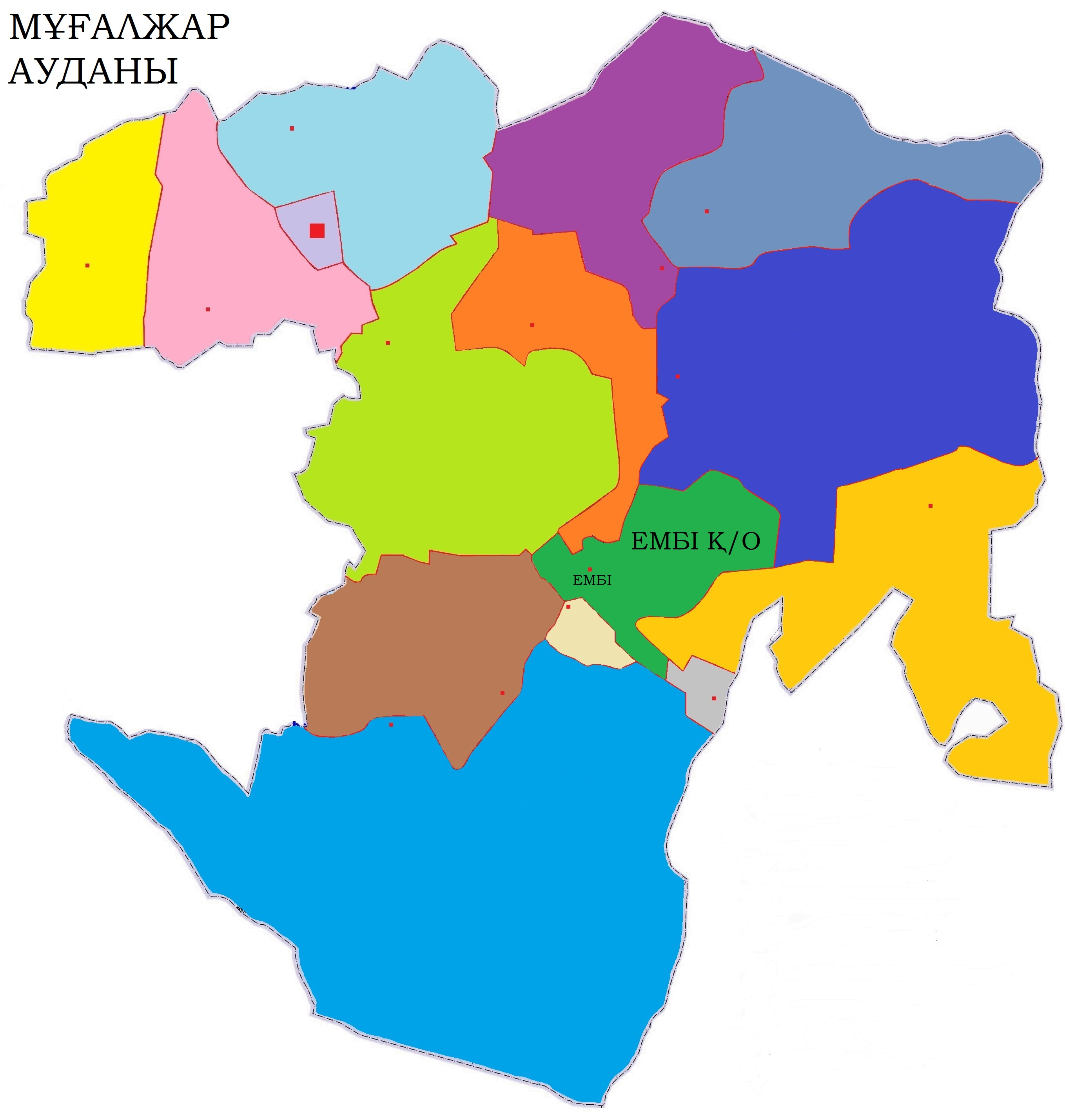 Ембі қаласы